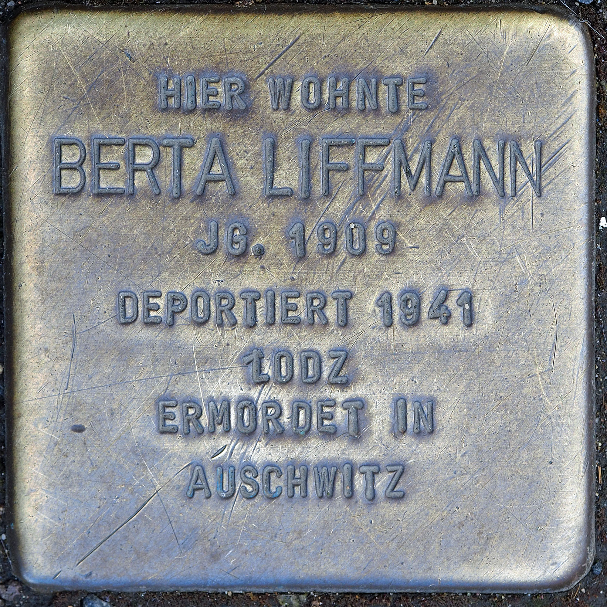 Stolpersteine MG: Liffmann, Berta